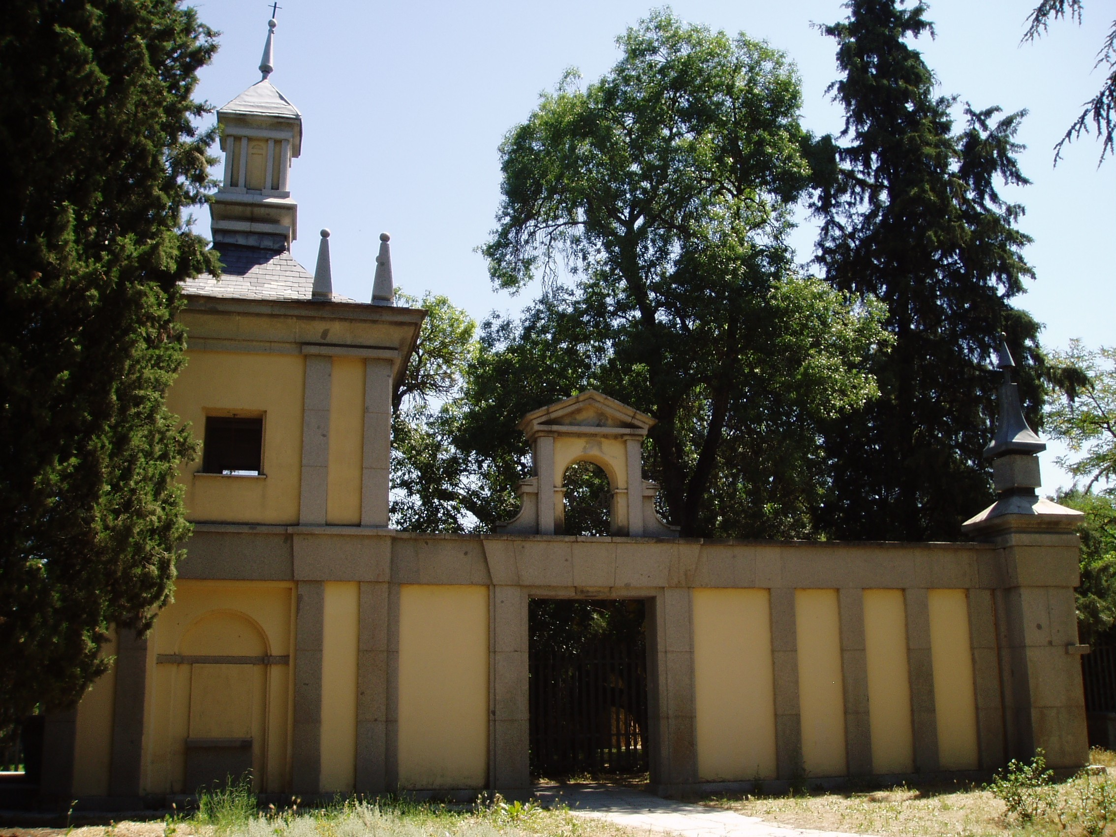 Ermita de San Pedro. Casa de Campo. Madrid. España